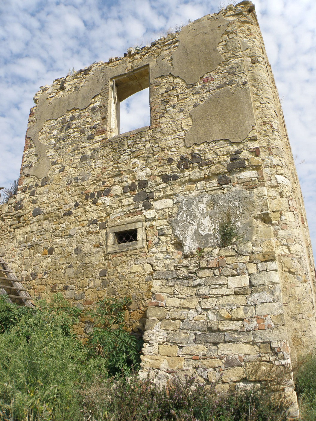 Zámek, částečná zřícenina Libčeves, Libčeves